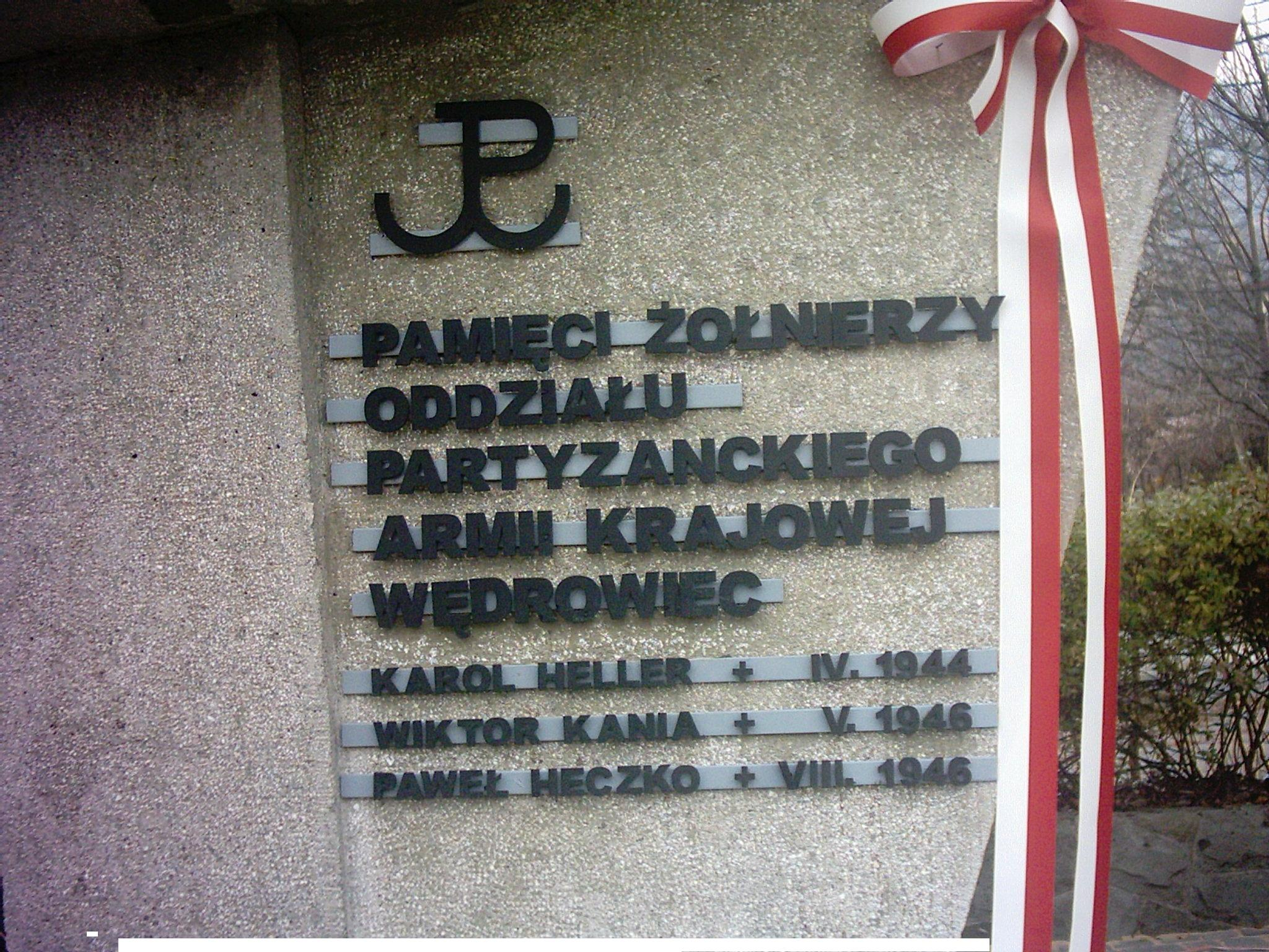 Pomnik Brenna ul. Górecka. Odsłonięcie 2005 r.